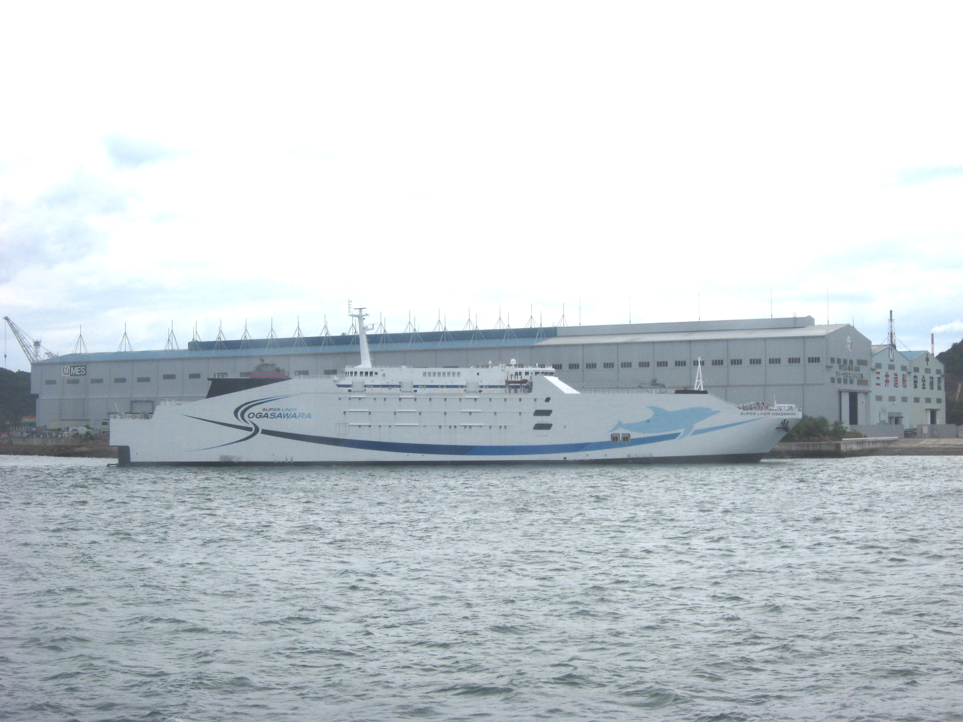 Super Liner Ogasawara, by Mitsui Zosen, at Tamano, Okayama, Japan. IMO number: 9287950 Callsign : 7JAH